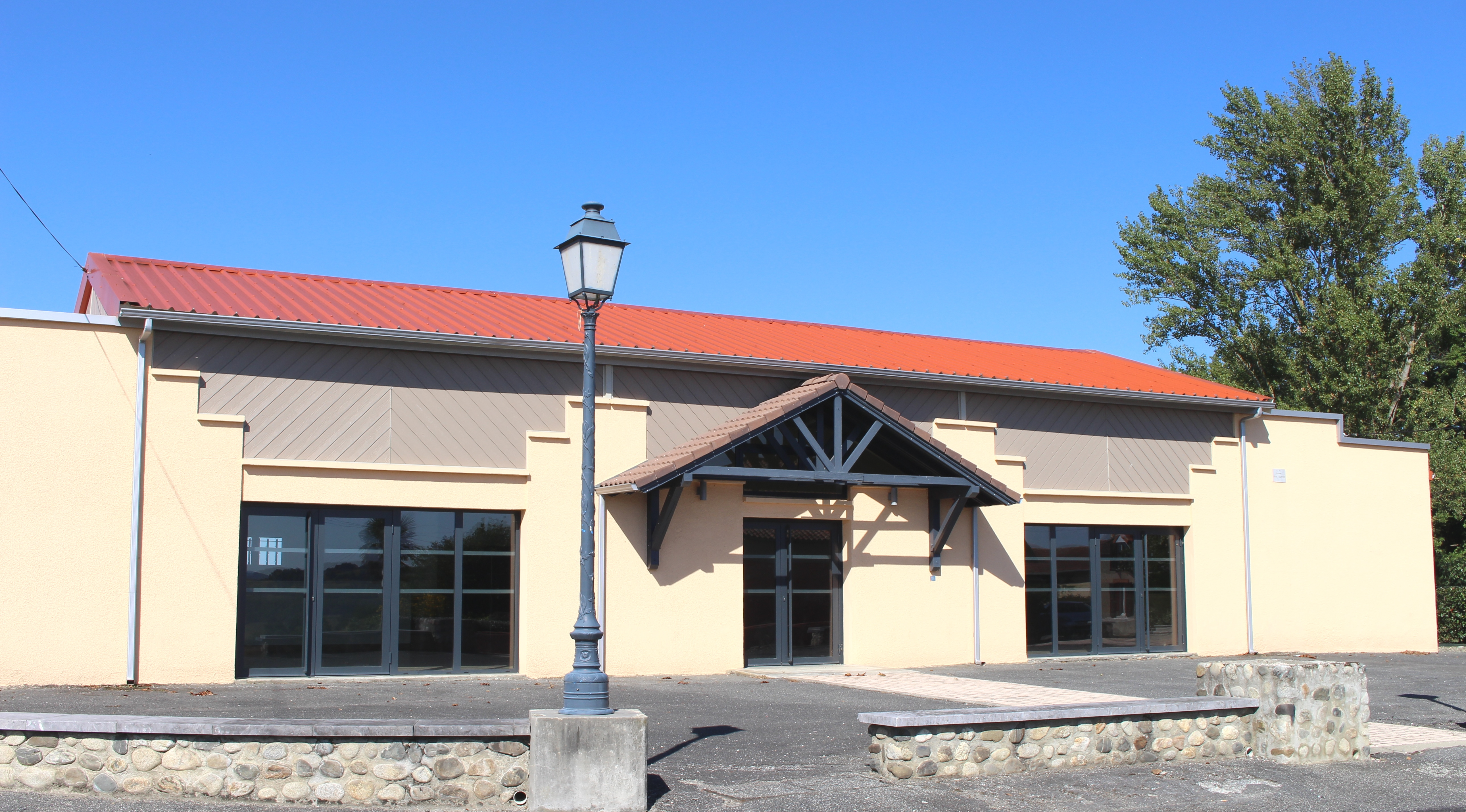 Salle des fêtes de Lacassagne (Hautes-Pyrénées)